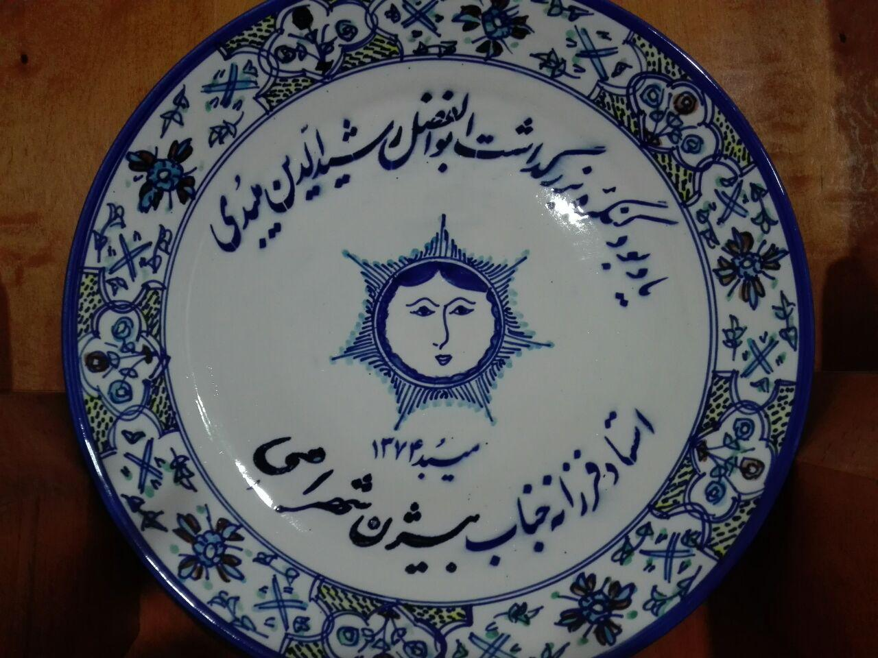 یابود بیژن شهرامی در کنگره میبدی